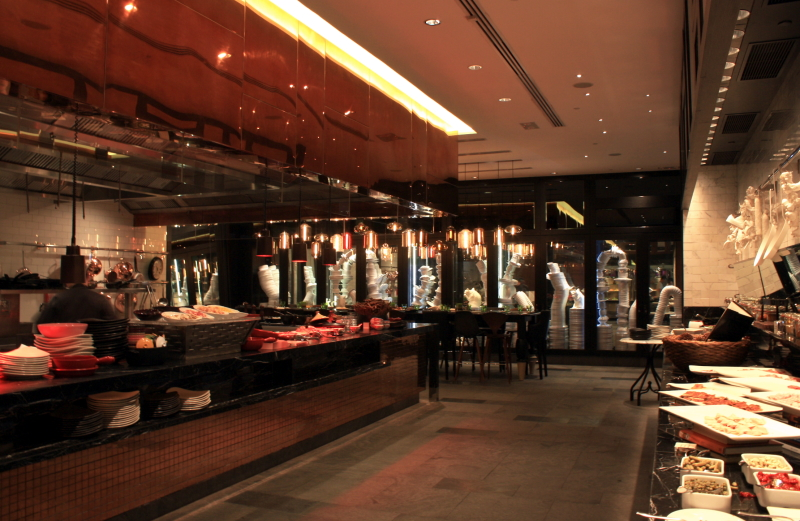 W Hotel Hong Kong Kirchen Restaurant Interior 香港W酒店 Kitchen餐廳